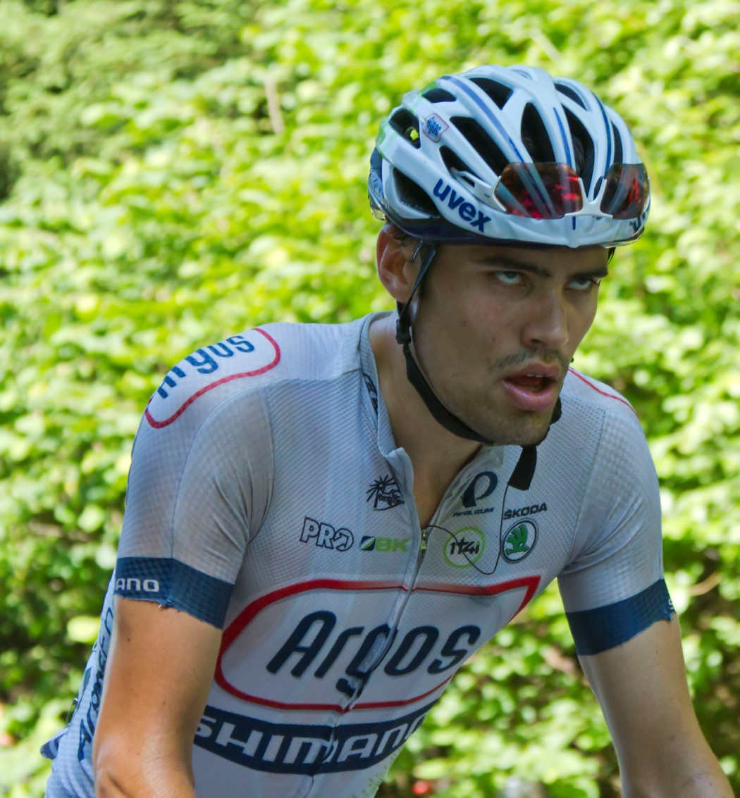 531 tom dumoulin